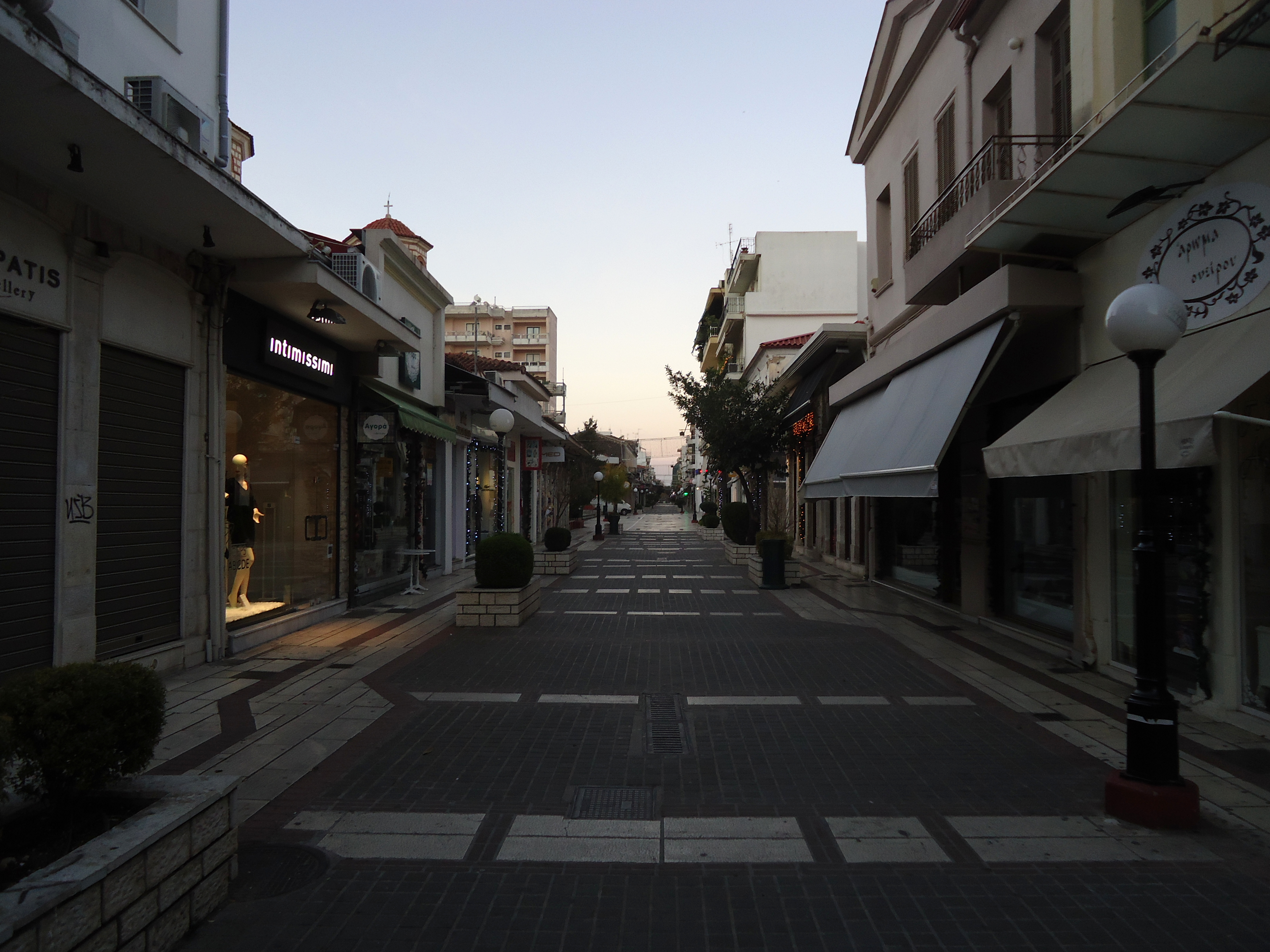 Οδός Σκουφά, Άρτα